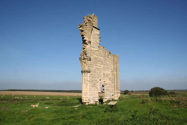 Barlings Abbey ruins